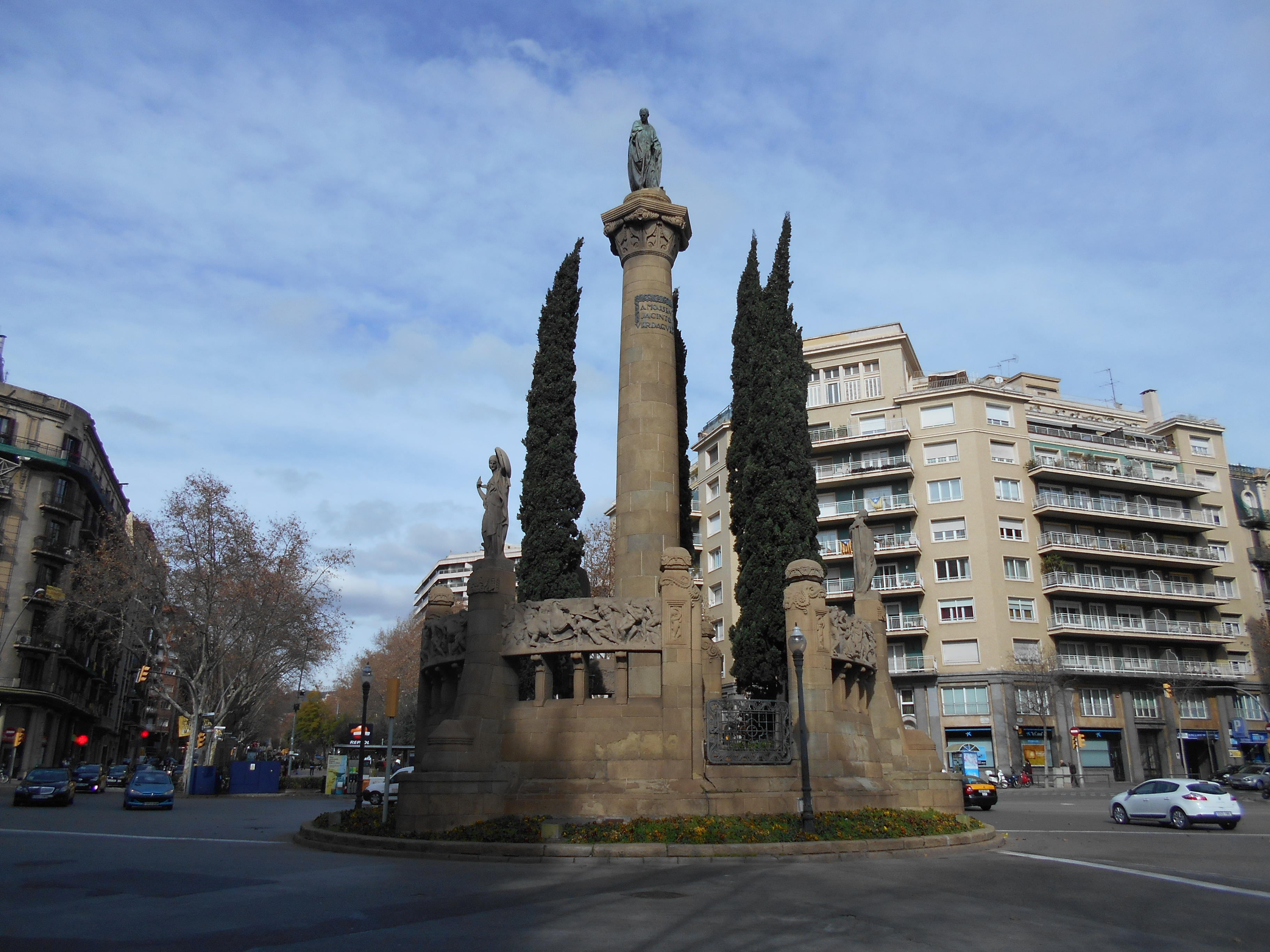 Plaza de Mosén Jacint Verdaguer (Barcelona).